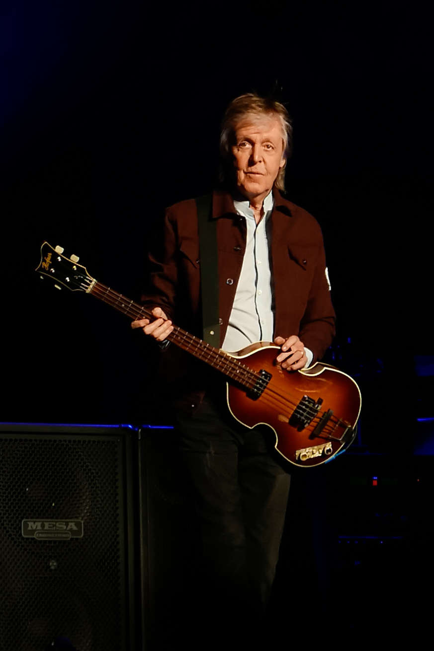 Paul McCartney podczas koncertu w Krakowie w 2018r.